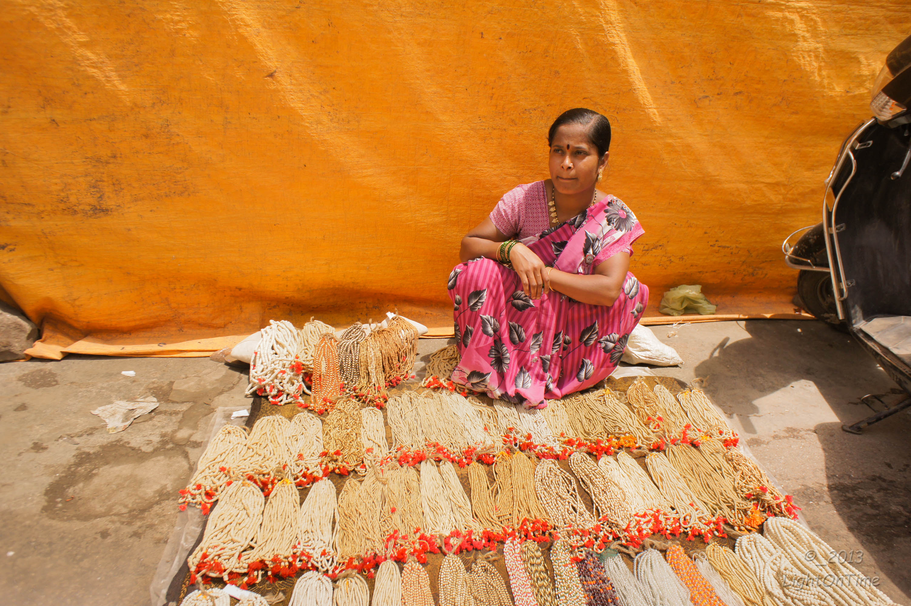 Pundlik Nagar, Pandharpur, Maharashtra 413304, India